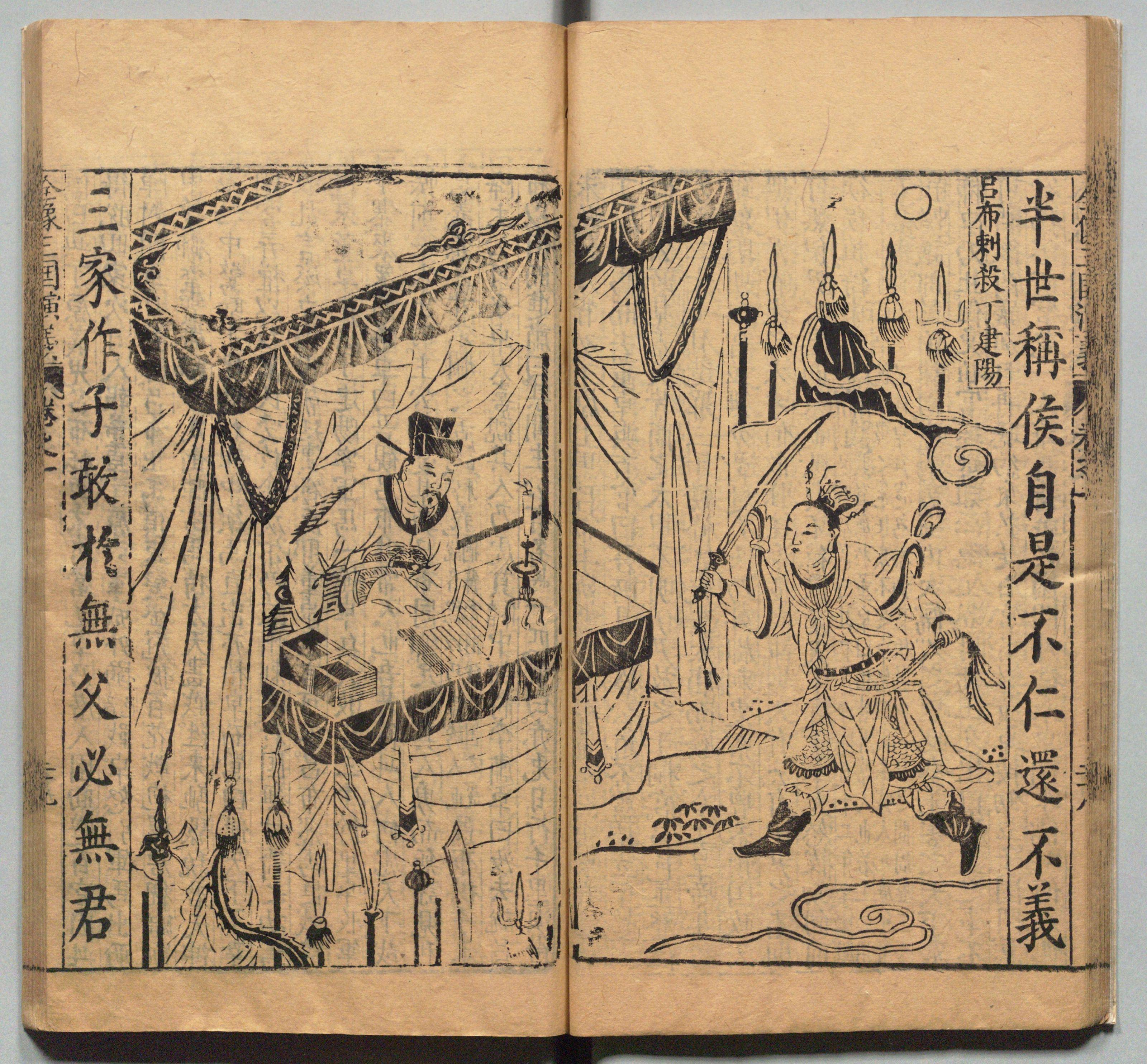 《新刊校正古本大字音释三国志通俗演义》 明万历十九年书林周曰校刊本